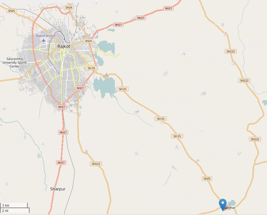 Sardhar